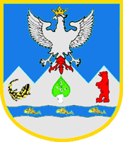 Герб Великоберезнянського району